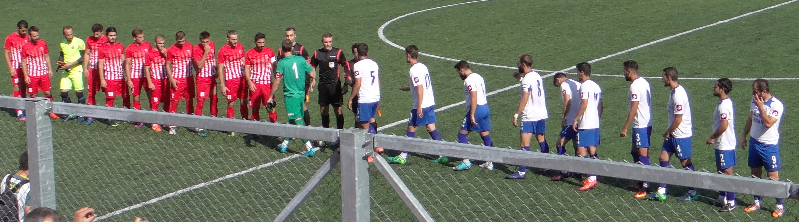 SAMET KAAN KESKİN (Hakem) İSA SÜTCÜ (1. Yardımcı Hakem) OZAN BURAK AKDUMAN (2. Yardımcı Hakem) BAŞİSKELE DOĞANTEPESPOR 43. ÖNDER TİRYAKİ 2. BAYRAM CAN ALYURT 81. SERCAN ŞAŞMAZ 16. EMİRHAN ÖNDER 41. VOLKAN KESİM 5. MURAT TİRAKİ 7. İBRAHİM ENES SÜLÜN 20. ORHAN ŞENMEMİŞ 9. MELİH KILIÇ 25. FURKAN YUSUF AKALAN 99. MERT ERÇAKIR İSTANBUL BEYLİKDÜZÜSPOR 1. ERAY ÇALIŞKAN 2. MUSTAFA YALÇIN 3. UFUK ERDEM CİHANYANDI 4. BURAK ZİYATTİN ALTINDAŞ 5. GÜR EGE GÜREL 6. BİRKAN TONYALI 8. MEHMET ENSARİ BİLDİK 11. SEMİH BAŞTAN 9. ADEM ÇALIK 10. BLENDI MEMAJ 7. MUHAMMET ÇETİN Source: [1]